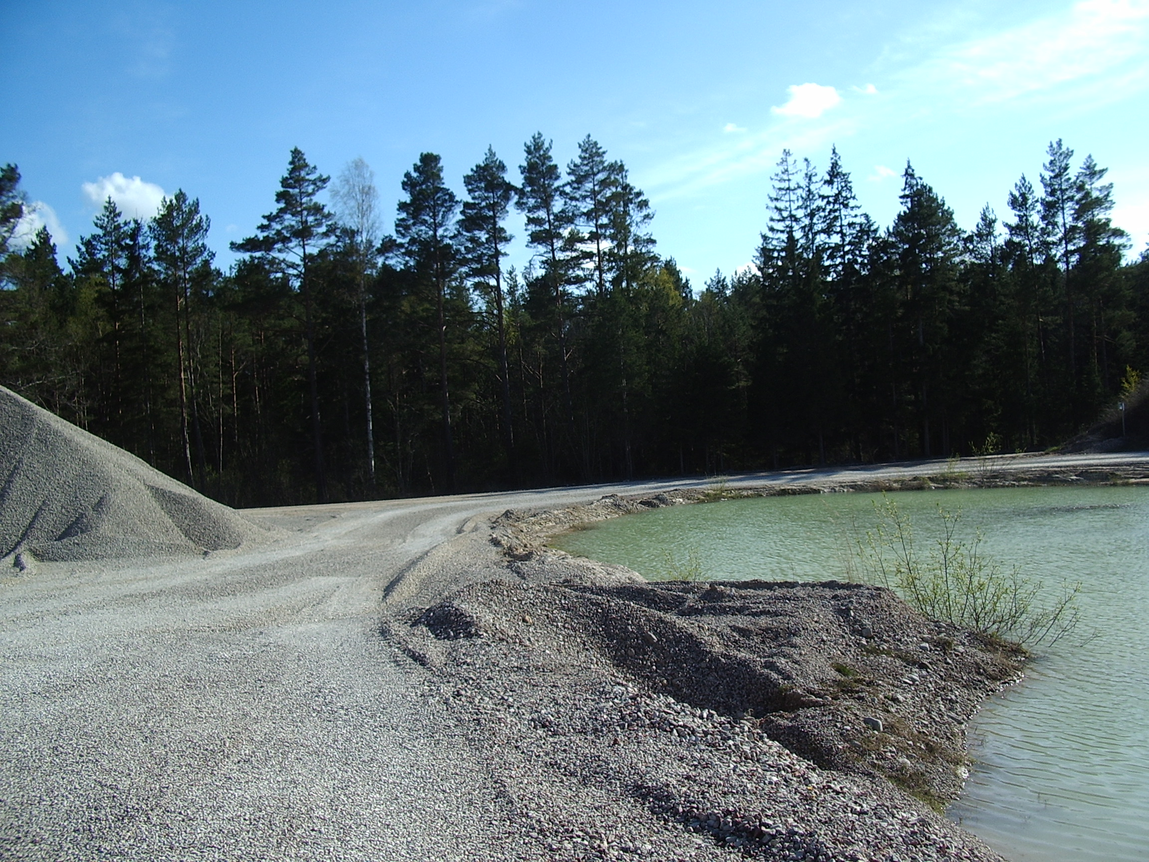 Kruusakarjäär